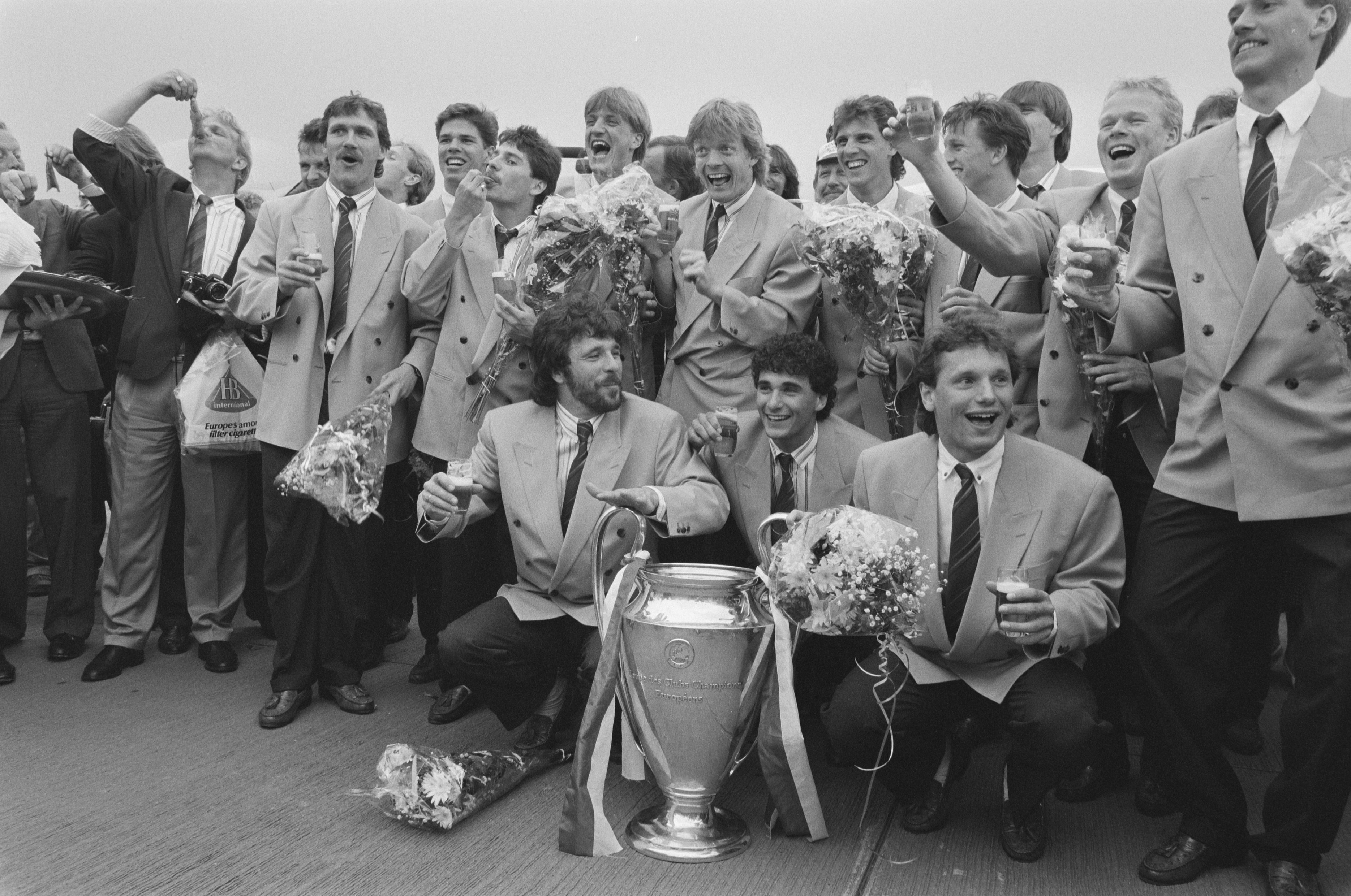 Collectie / Archief : Fotocollectie Anefo Reportage / Serie : [ onbekend ] Beschrijving : Aankomst PSV met Europa Cup I op vliegveld Eindhoven Datum : 26 mei 1988 Locatie : Eindhoven, Noord-Brabant Trefwoorden : sport, voetbal Instellingsnaam : PSV Fotograaf : Bogaerts, Rob / Anefo, [onbekend] Auteursrechthebbende : Nationaal Archief Materiaalsoort : Negatief (zwart/wit) Nummer archiefinventaris : bekijk toegang 2.24.01.05 Bestanddeelnummer : 934-2547